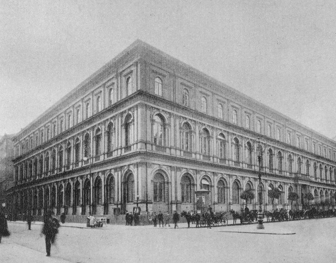 Gmach Towarzystwa Kredytowego Ziemskiego przy ul. Kredytowej 1 w Warszawie